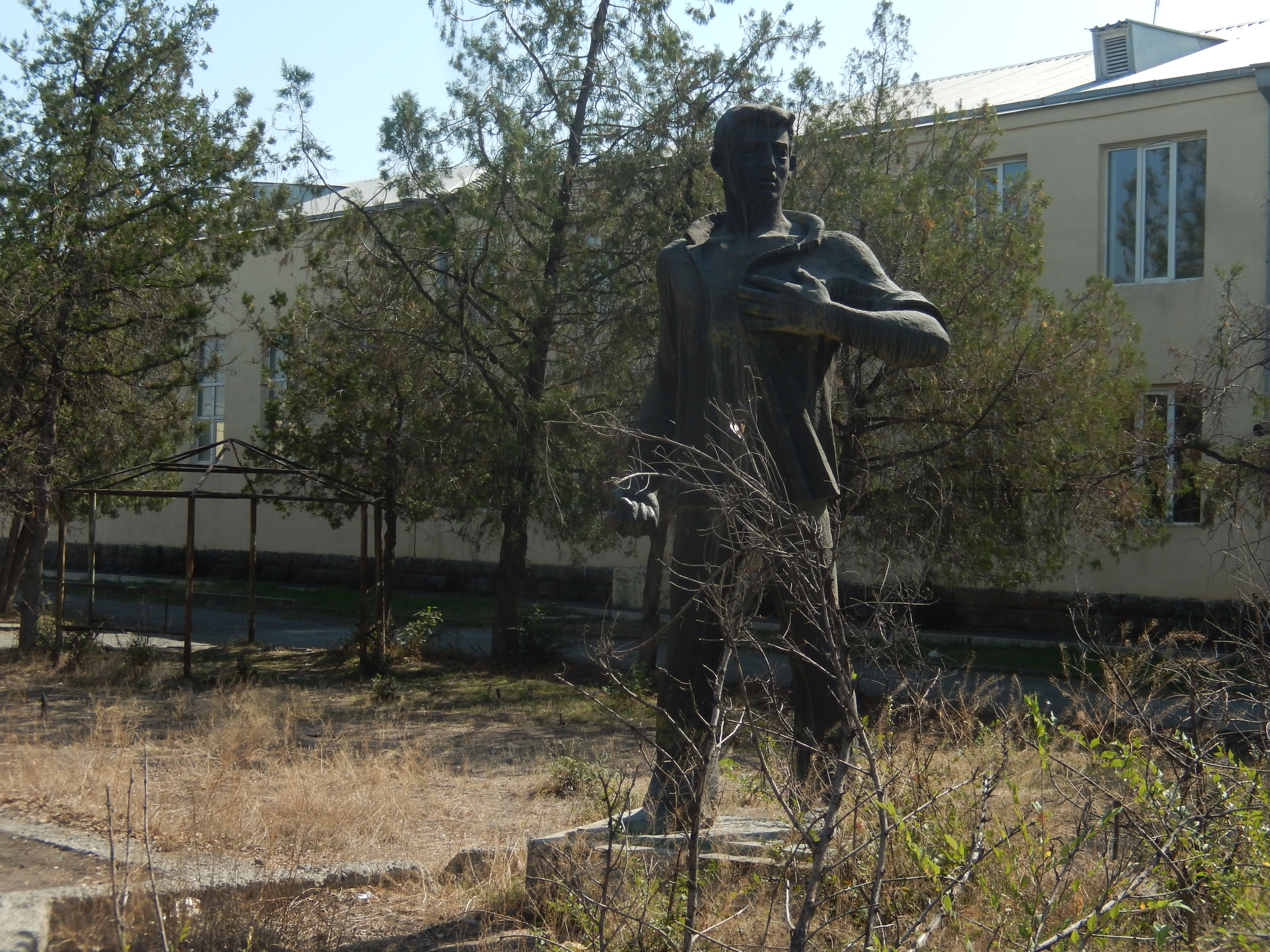 Ghukas Ghukasyan's monument, Ghukasavan 56/3